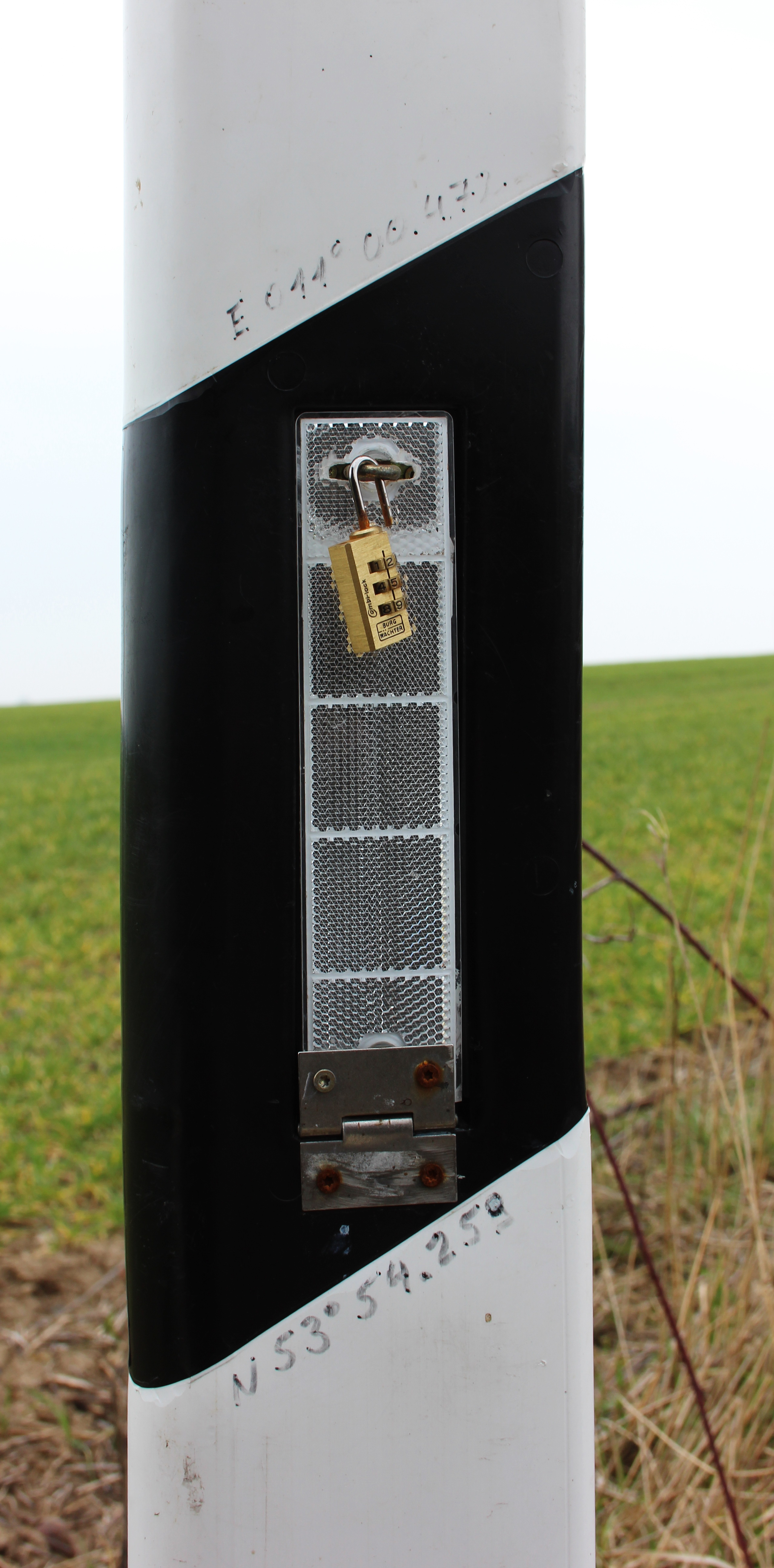 Geocachversteck in einer Warnbake